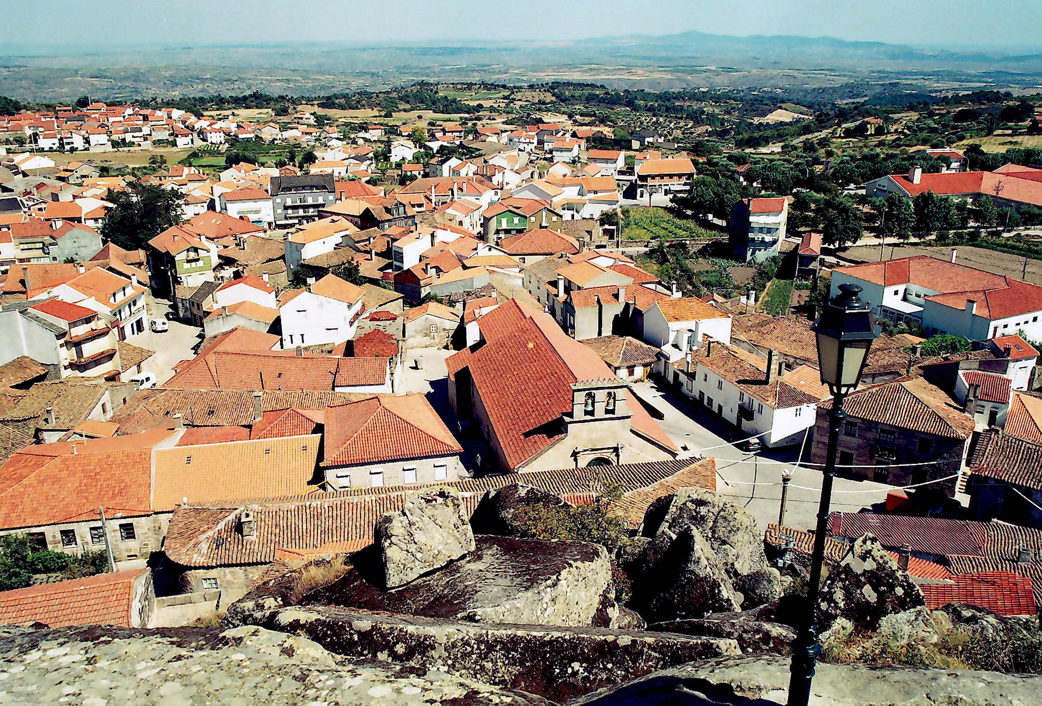 Meda Fotografia de Vitor Oliveira, integrada na colecção com o endereço